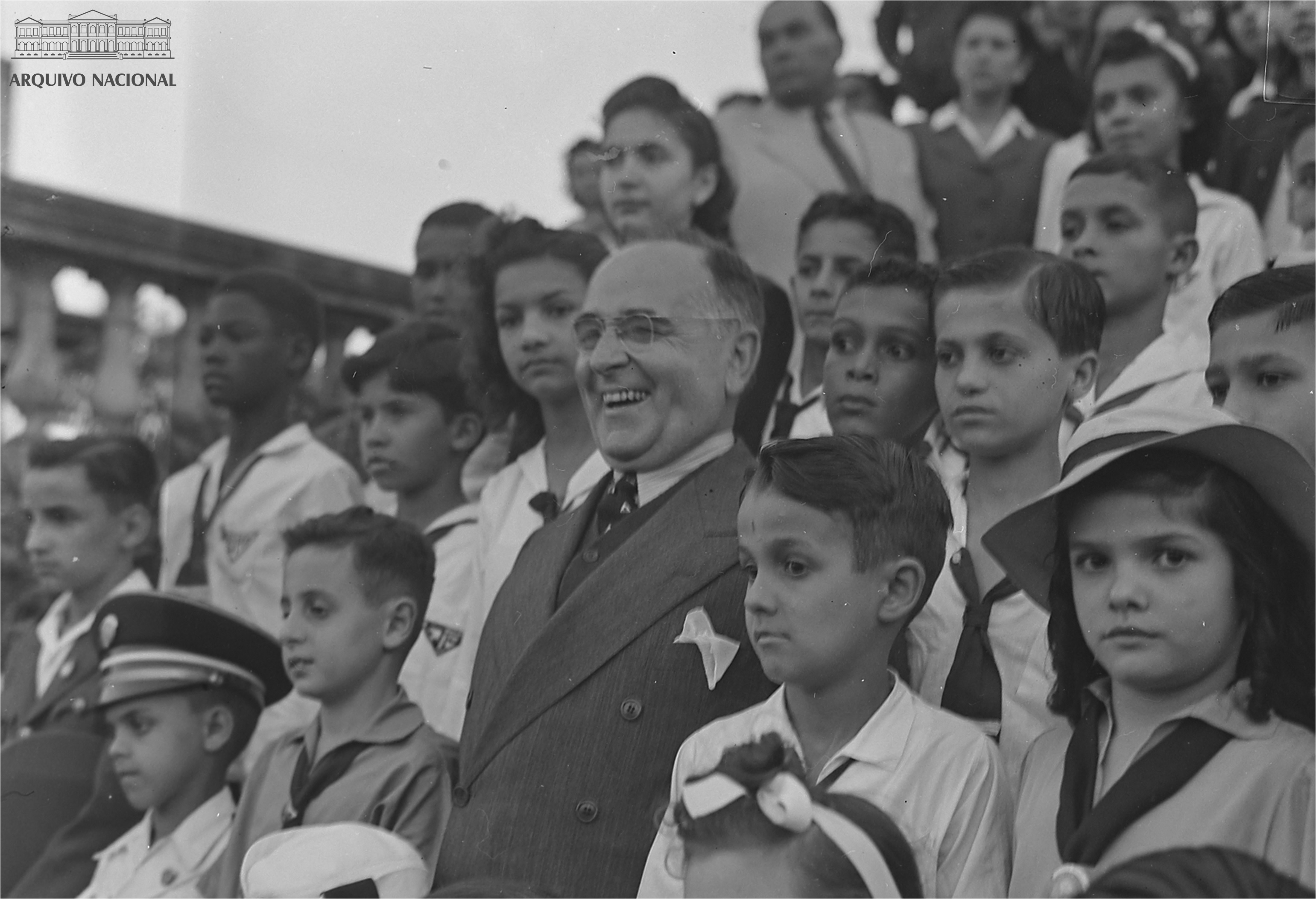 Vargas e crianças na Quinta da Boa Vista, durante as comemorações da Semana da Pátria, setembro de 1943. Arquivo Nacional. Fundo Agência Nacional.